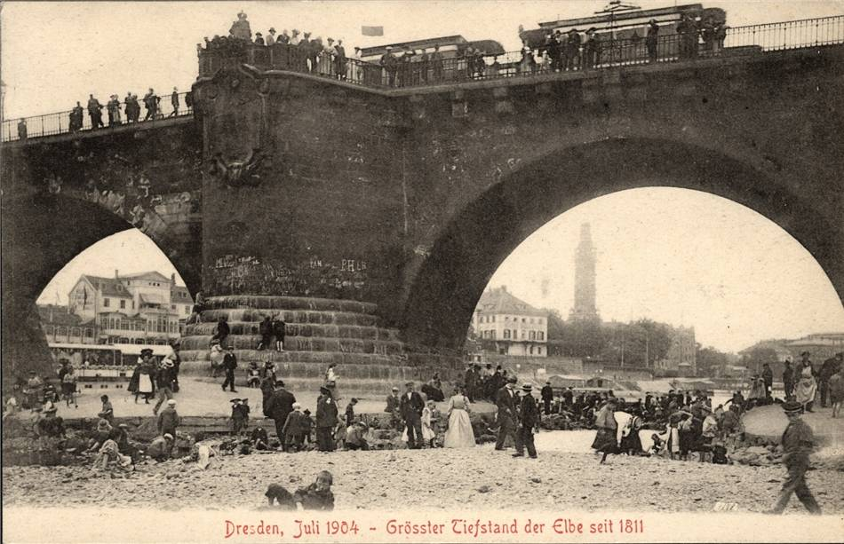 Die ausgetrocknete Elbe 1904 unterhalb der Ausgustusbrücke in Dresden